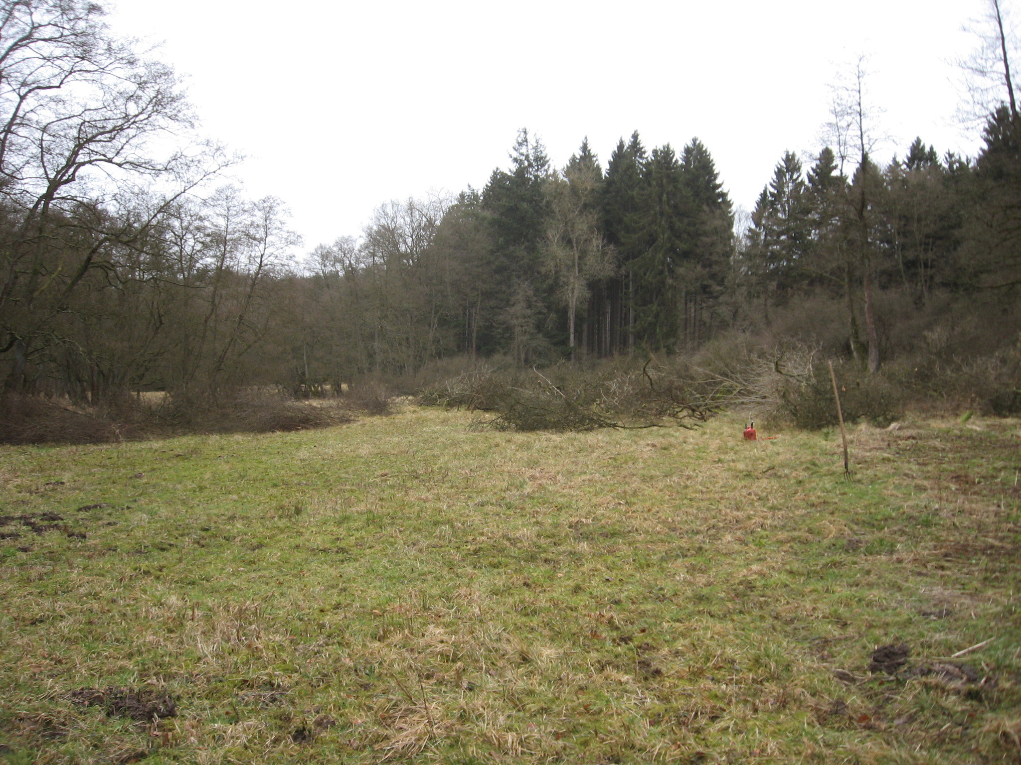 Umgesägte Schwarzdorngebüsche im Naturschutzgebiet Wäschebachtal / Tieberg (Marsberg, Hochsauerlandkreis, NRW, D.).